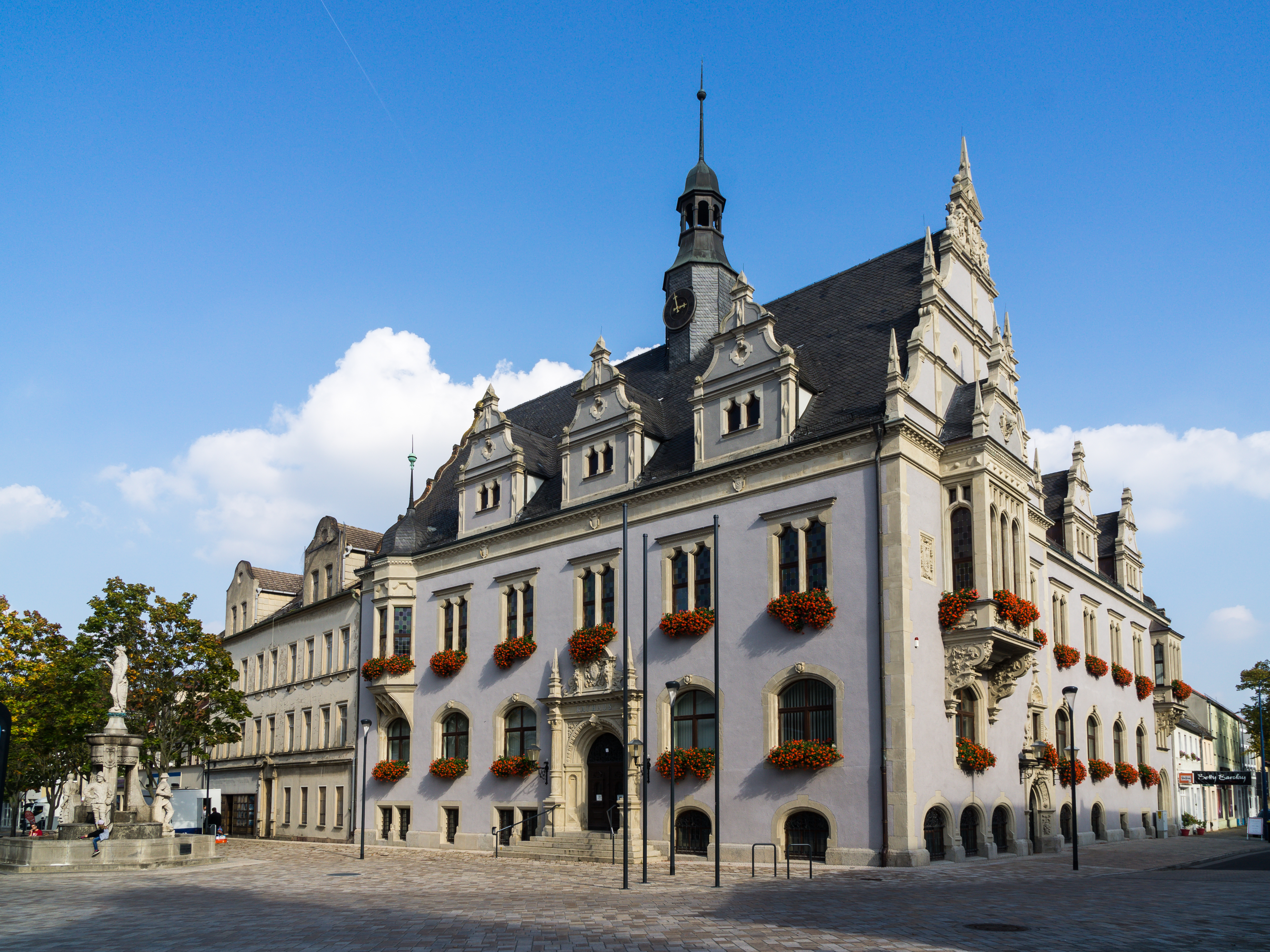 Rathaus, Markt 1 in Schönebeck (Elbe)